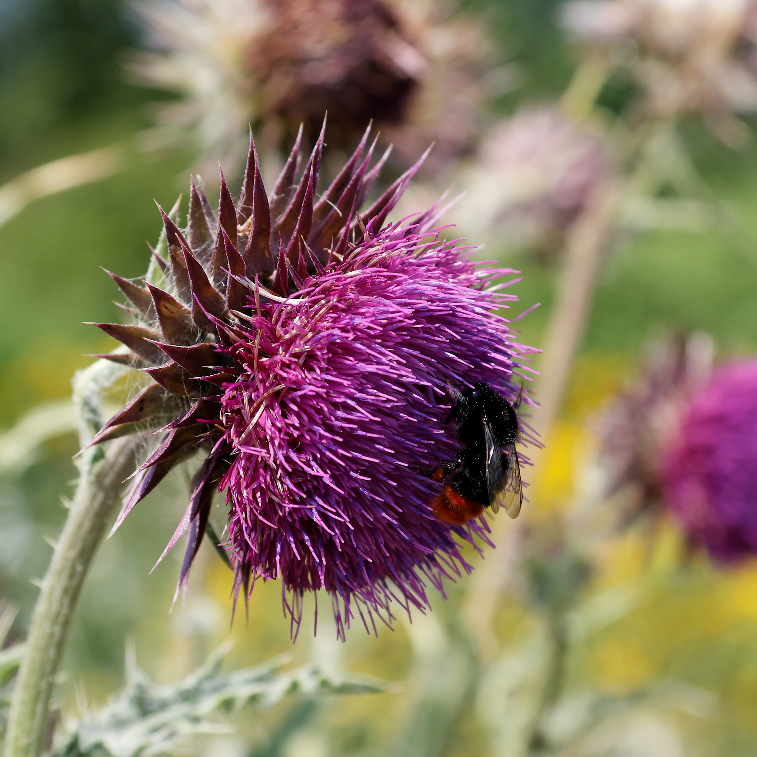 Carduus nutans